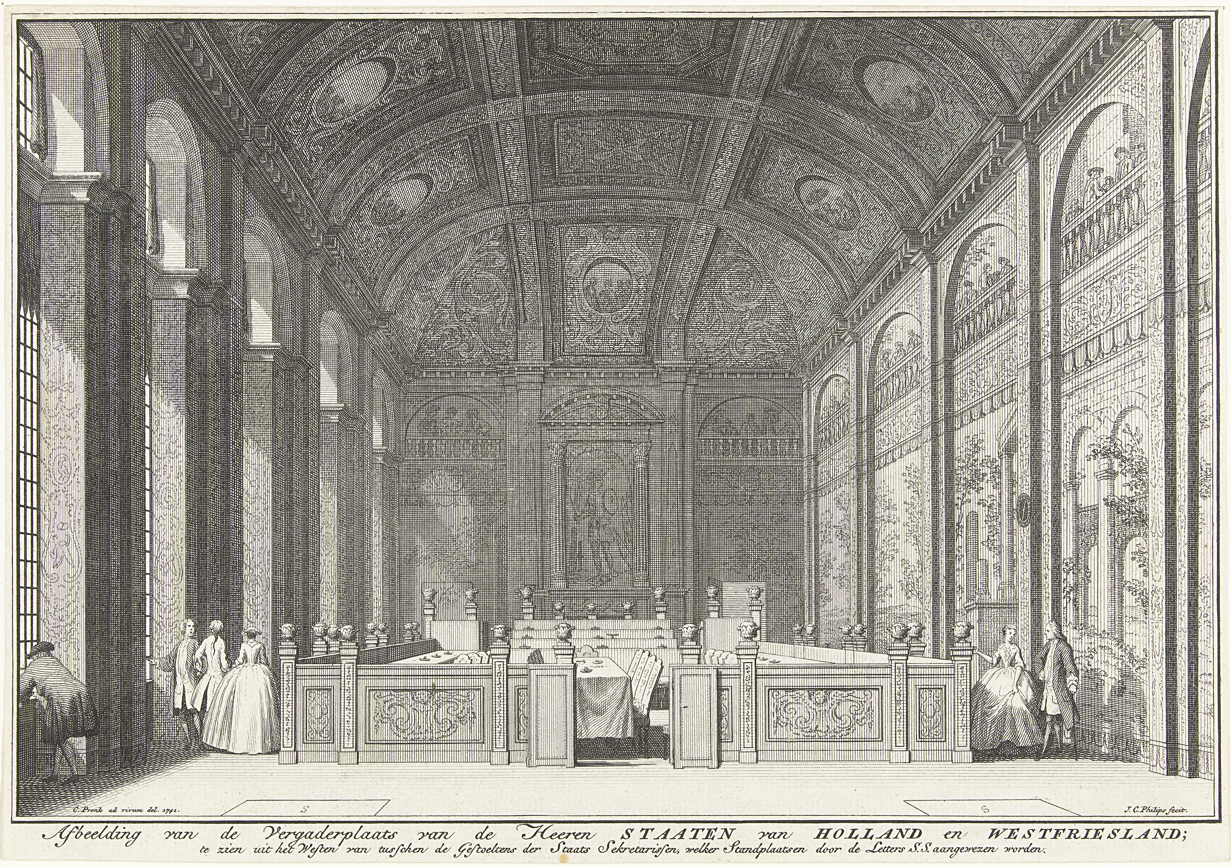 Vergaderzaal van de Staten van Holland en West-Friesland. 1741. Ets en gravure. Height: 16.9 cm (6.6 in); Width: 24 cm (9.4 in) dimensions QS:P2048,16.9U174728;P2049,24U174728. Amsterdam, Rijksmuseum Amsterdam.